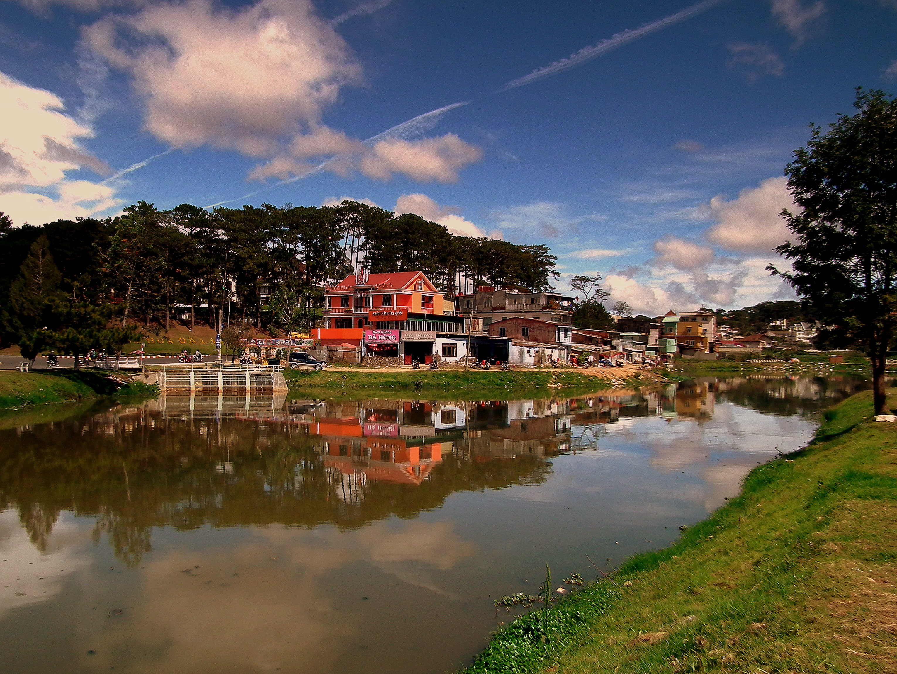 DA LAT VIETNAM JAN 2012